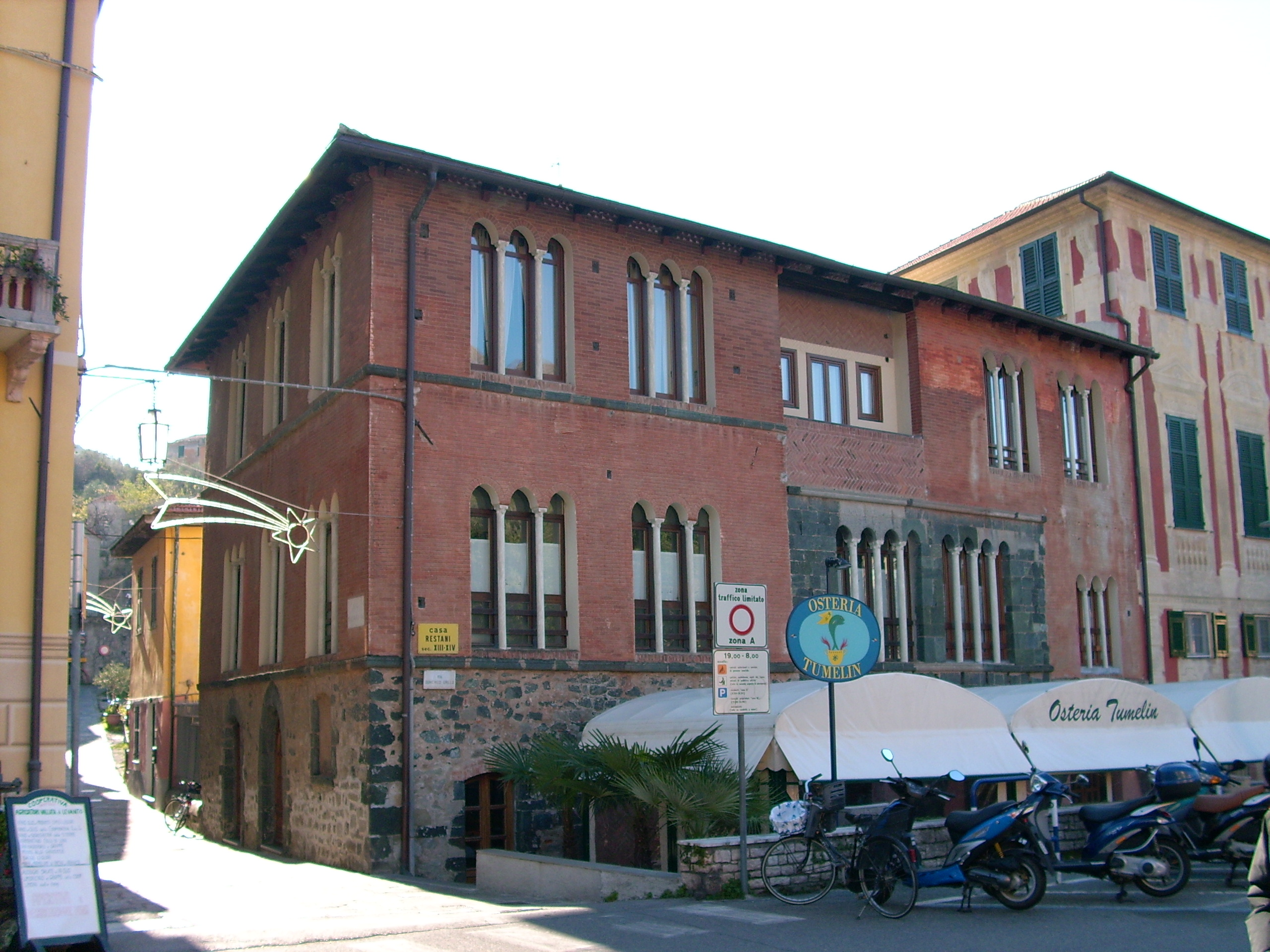 Casa Restani di Levanto, Liguria, Italia